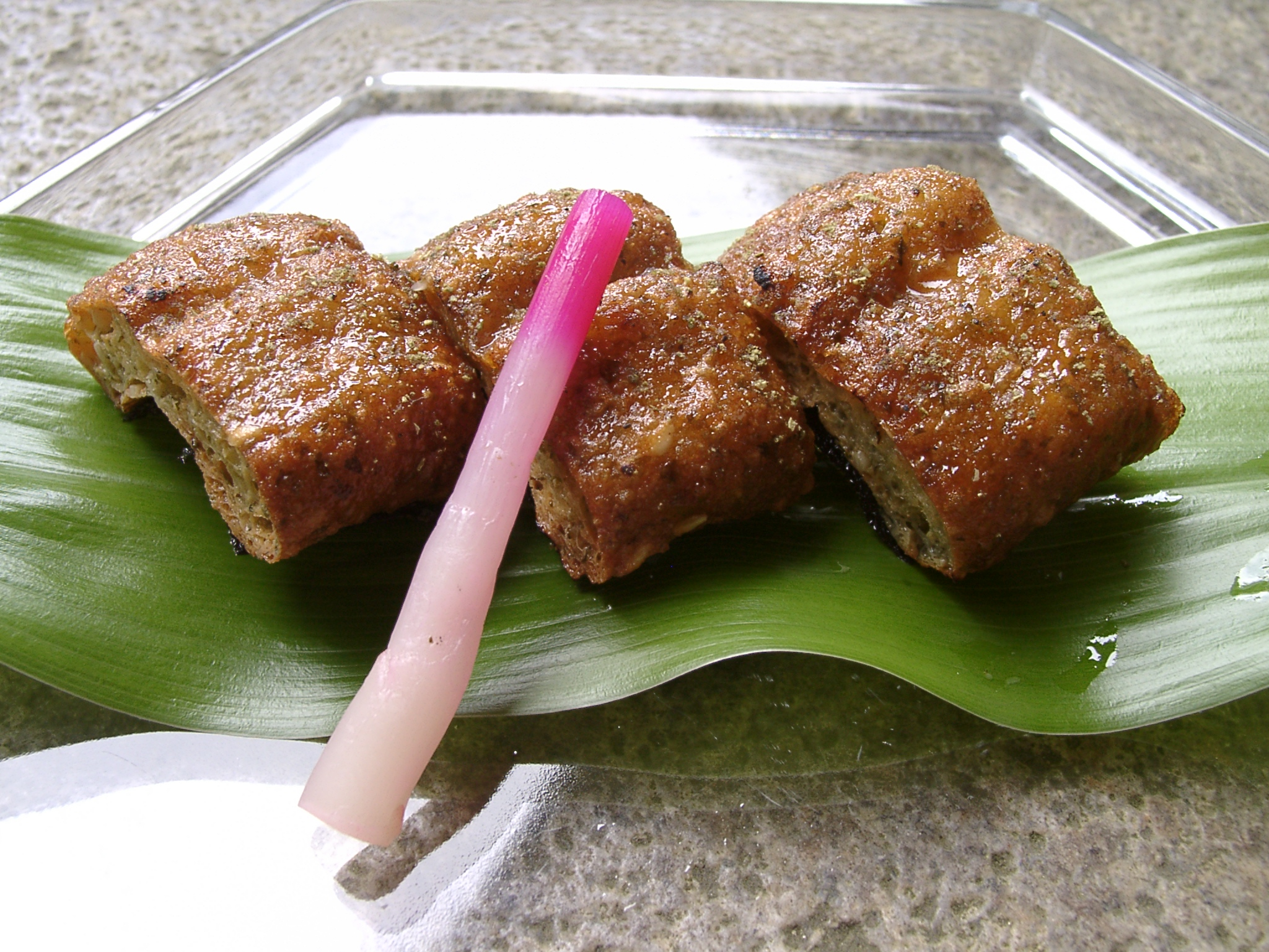 鰻もどきとも言う